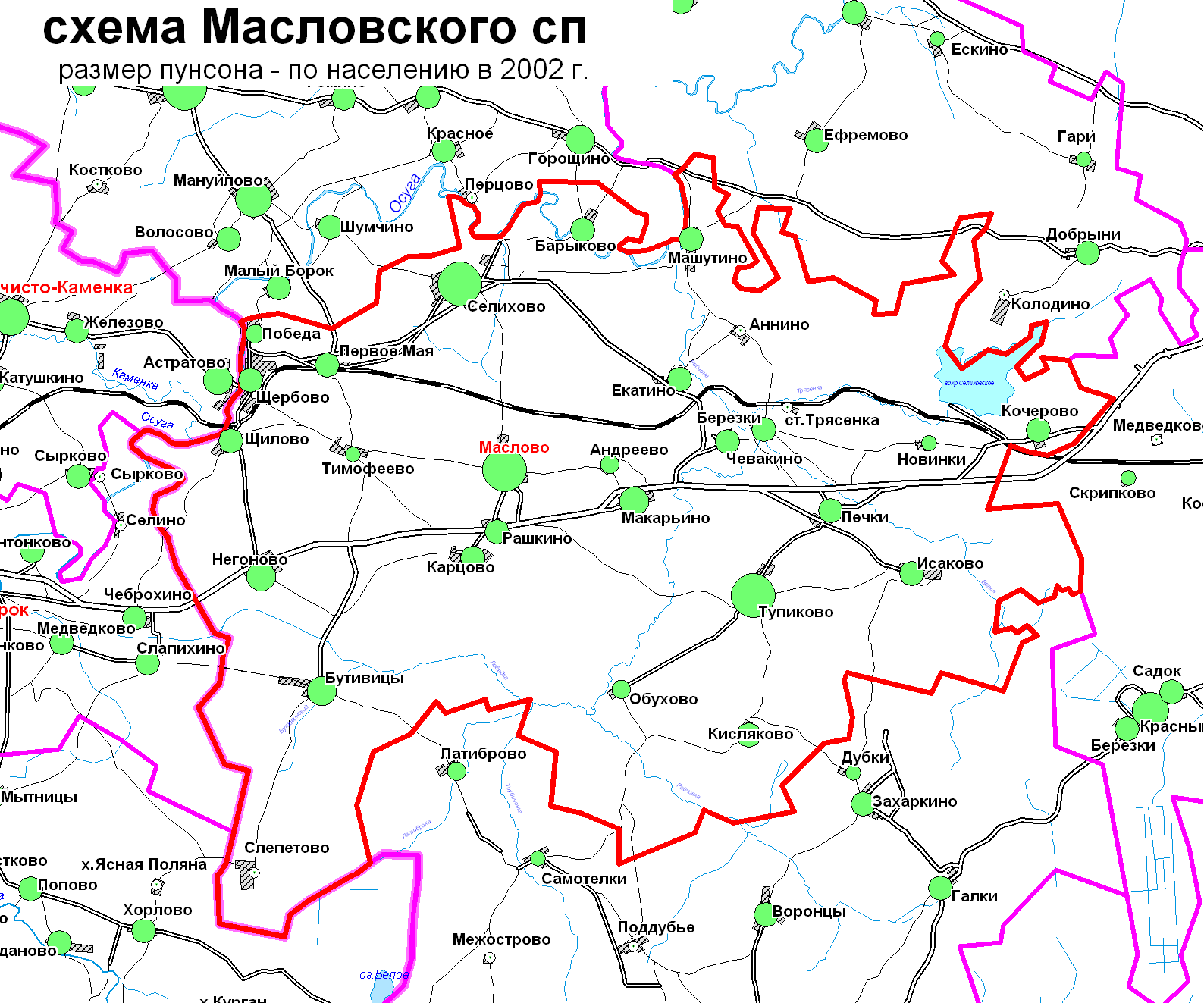 Схема Масловского СП Торжокского р-на